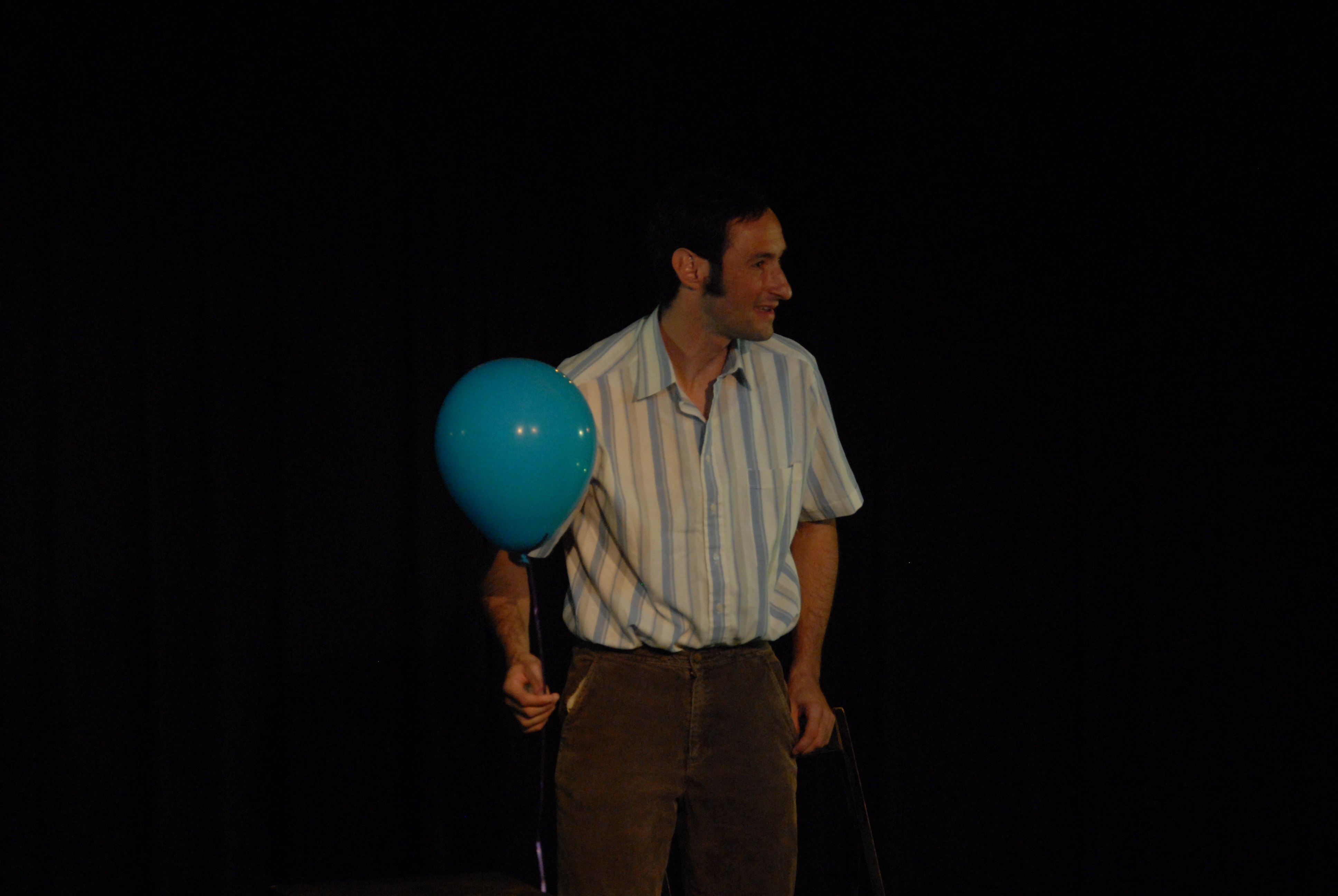 גל פרידמן